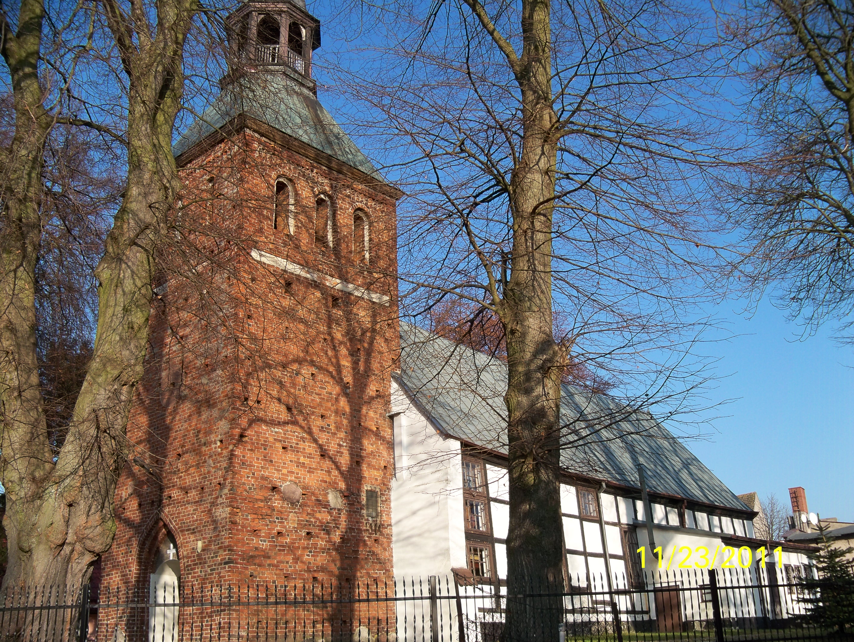 Zabytkowy kościół w Sianowie